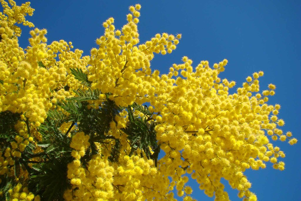 Mimosa, à Le Muy (var)